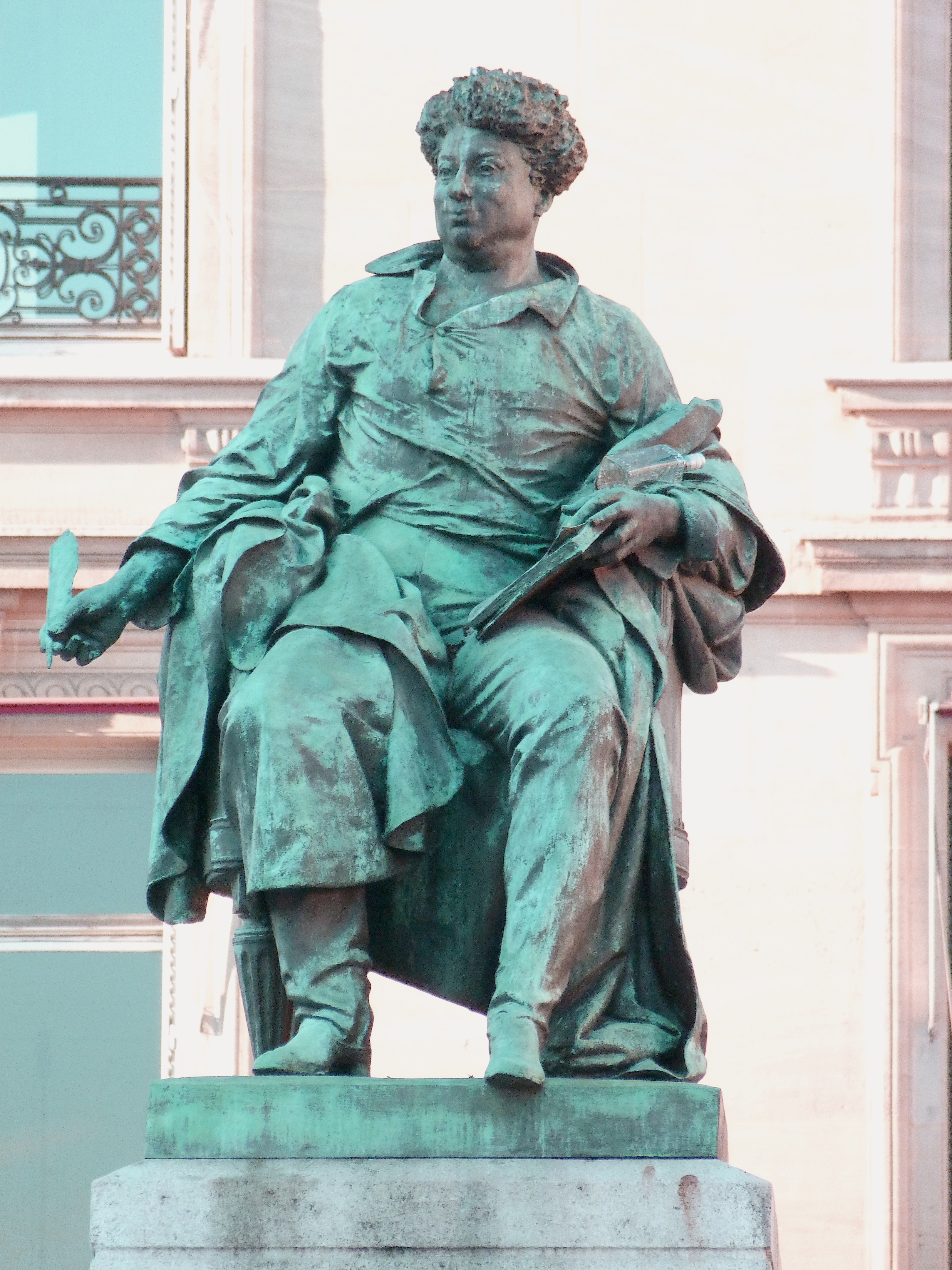 Statue d'Alexandre Dumas père, par Gustave Doré, (1832-1883), sur la place du Général-Catroux, Paris (17e arrond.) - La statue surmonte un monument inauguré en 1881.